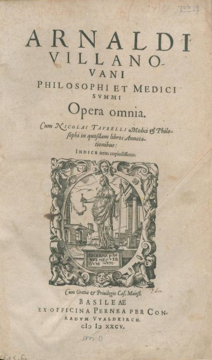 Arnaldus de Villa Nova, Opera, 1585, title page